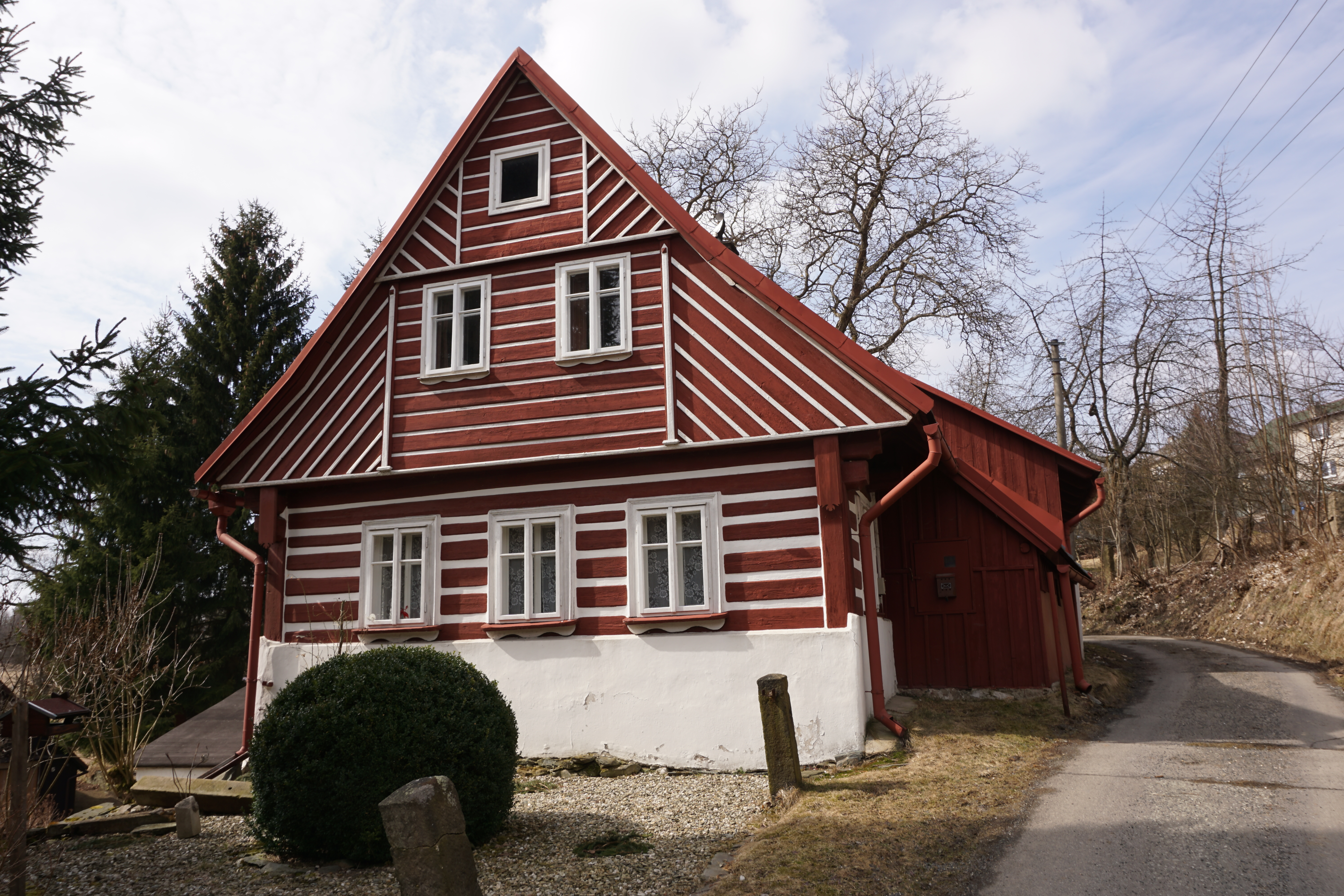 Střevelná (na Železnobrodsku) - chalupa če. 4